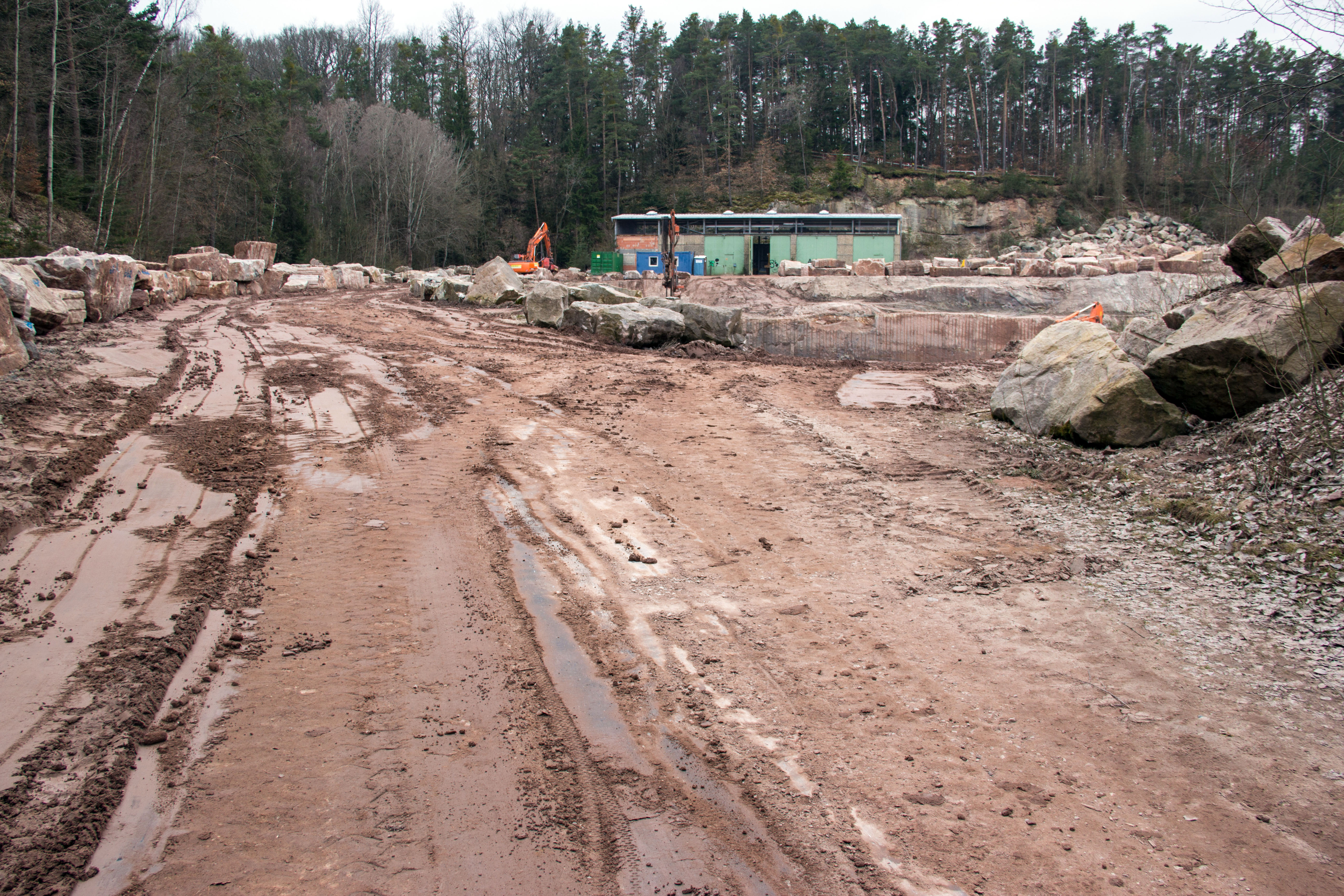 Steinbruch in Worzeldorf